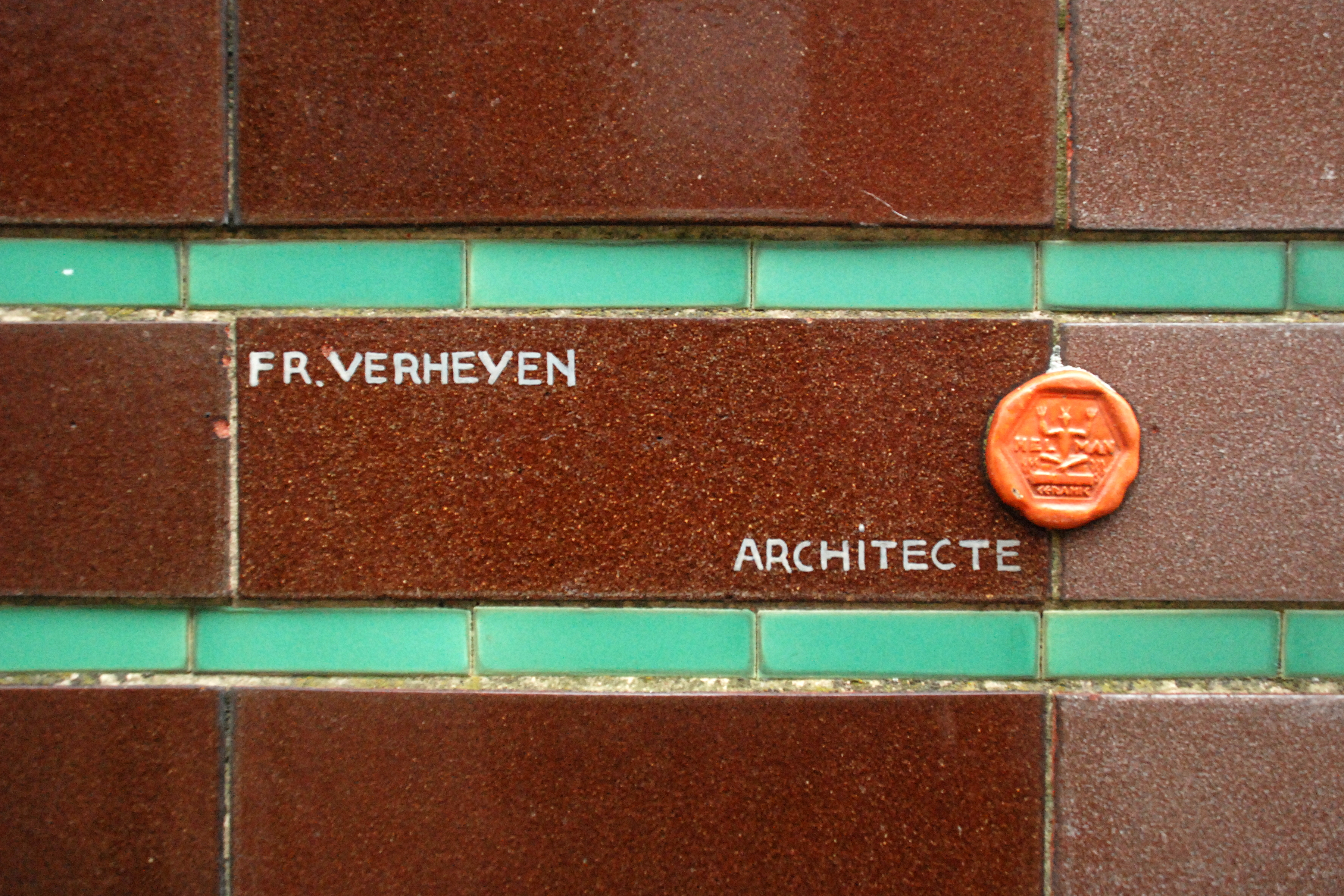 Belgique - Bruxelles - Berchem-Sainte-Agathe - Rue de l'Eglise 60 - Modernisme - Ateliers Helman